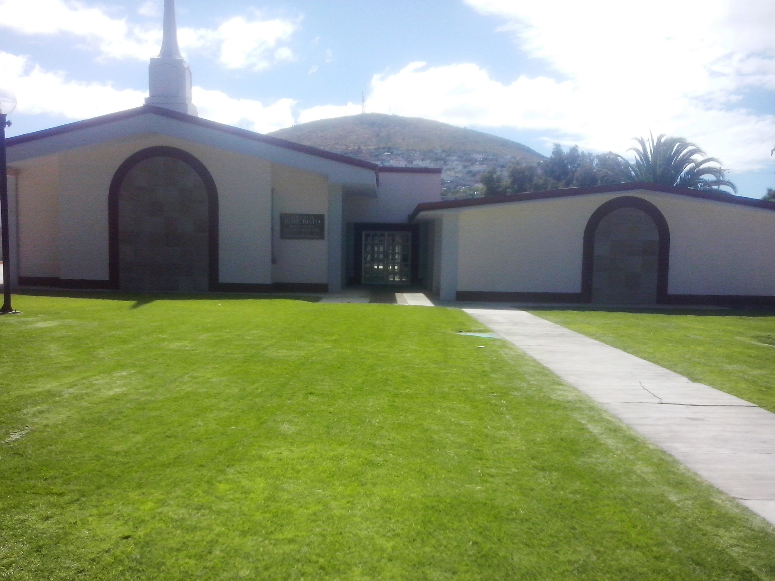 Edifico de la Iglesia de Jesucristo de los Santos de los Últimos Días ubicado en Av. Revolución en Pachuca de Soto, Hidalgo, México.